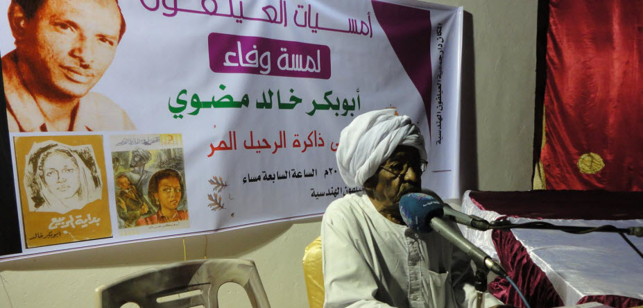 ندوة ومعرض إحتفاء بالفقيد بدار الجمعية الهندسية بالعيلفون